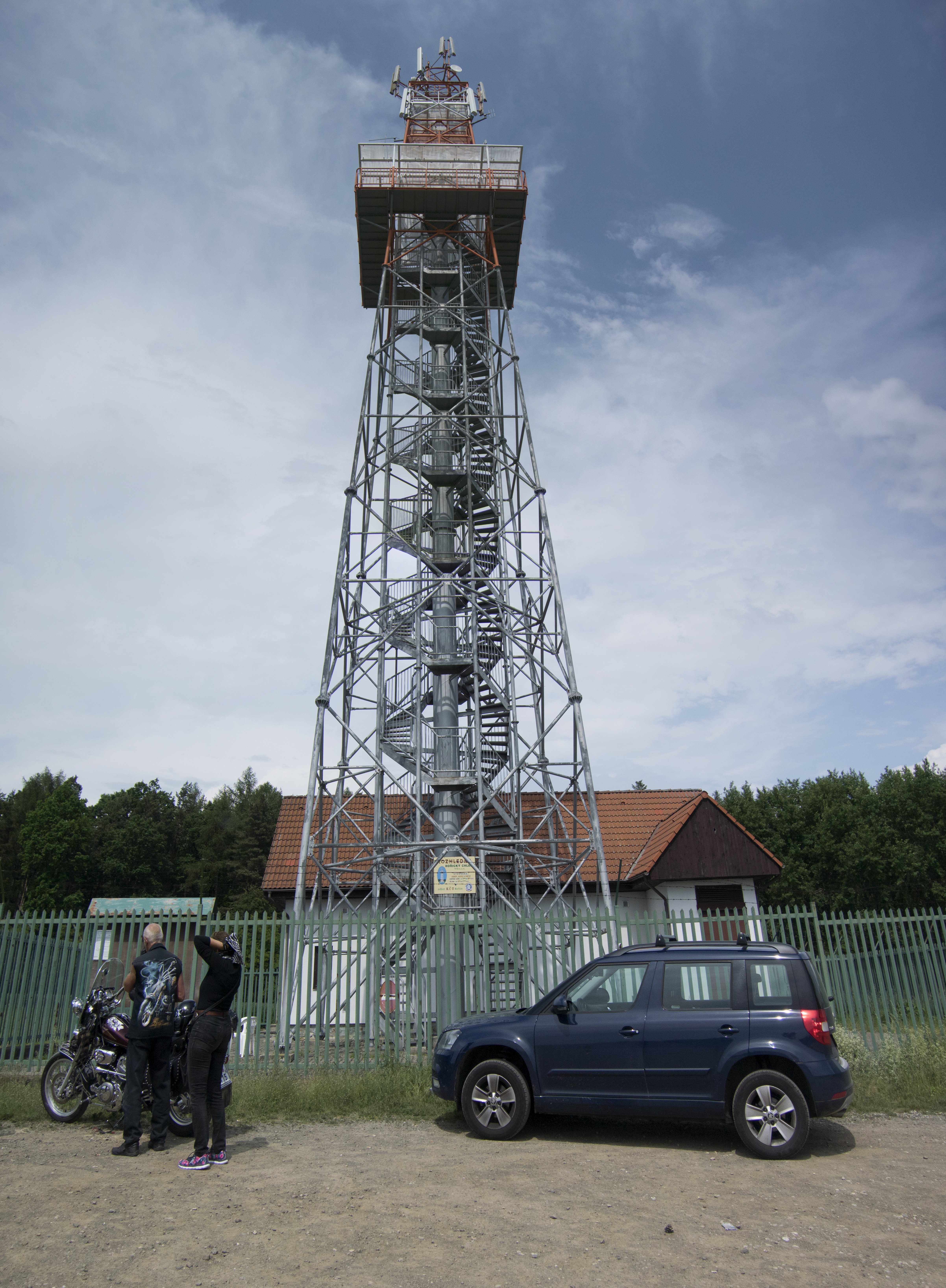 Rozhledna Hořický chlum z 28.5.2016